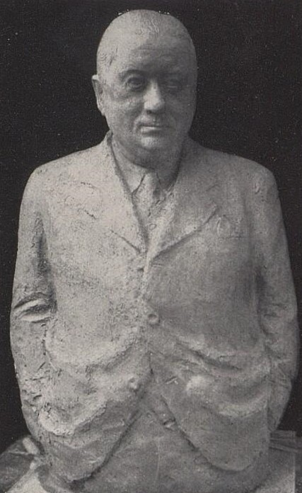 Marie Zlatníková: Jan Václav Rosůlek (1941, repro Salon)